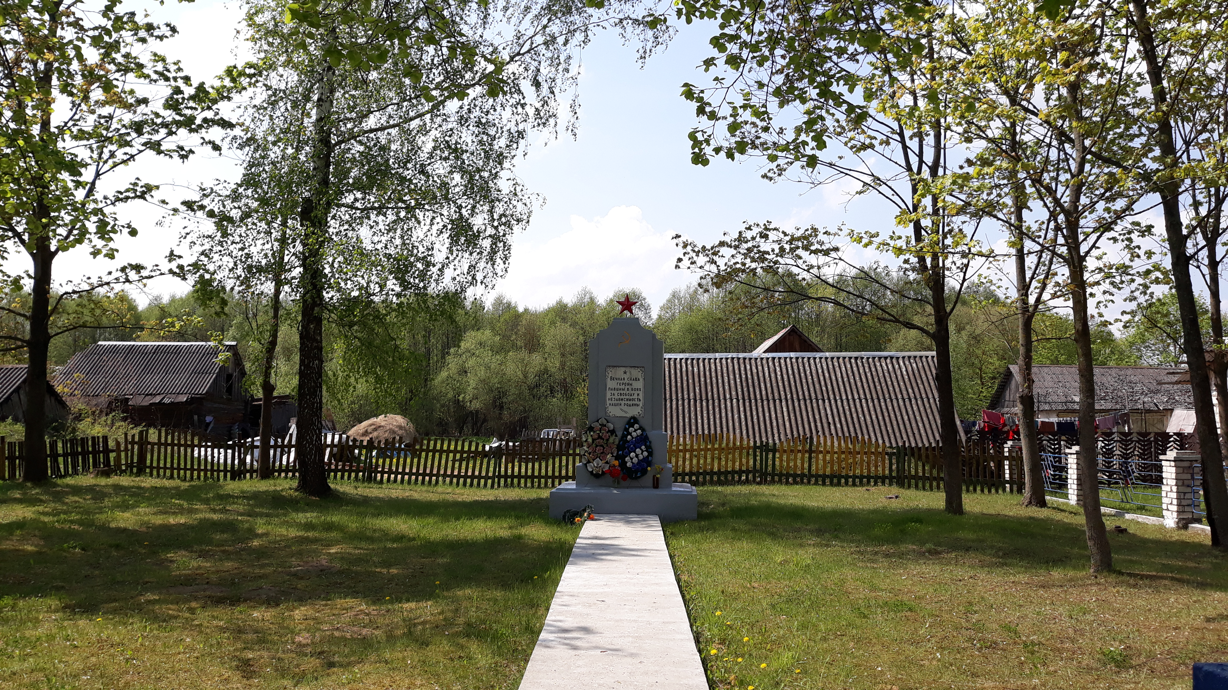 краявід вёскі